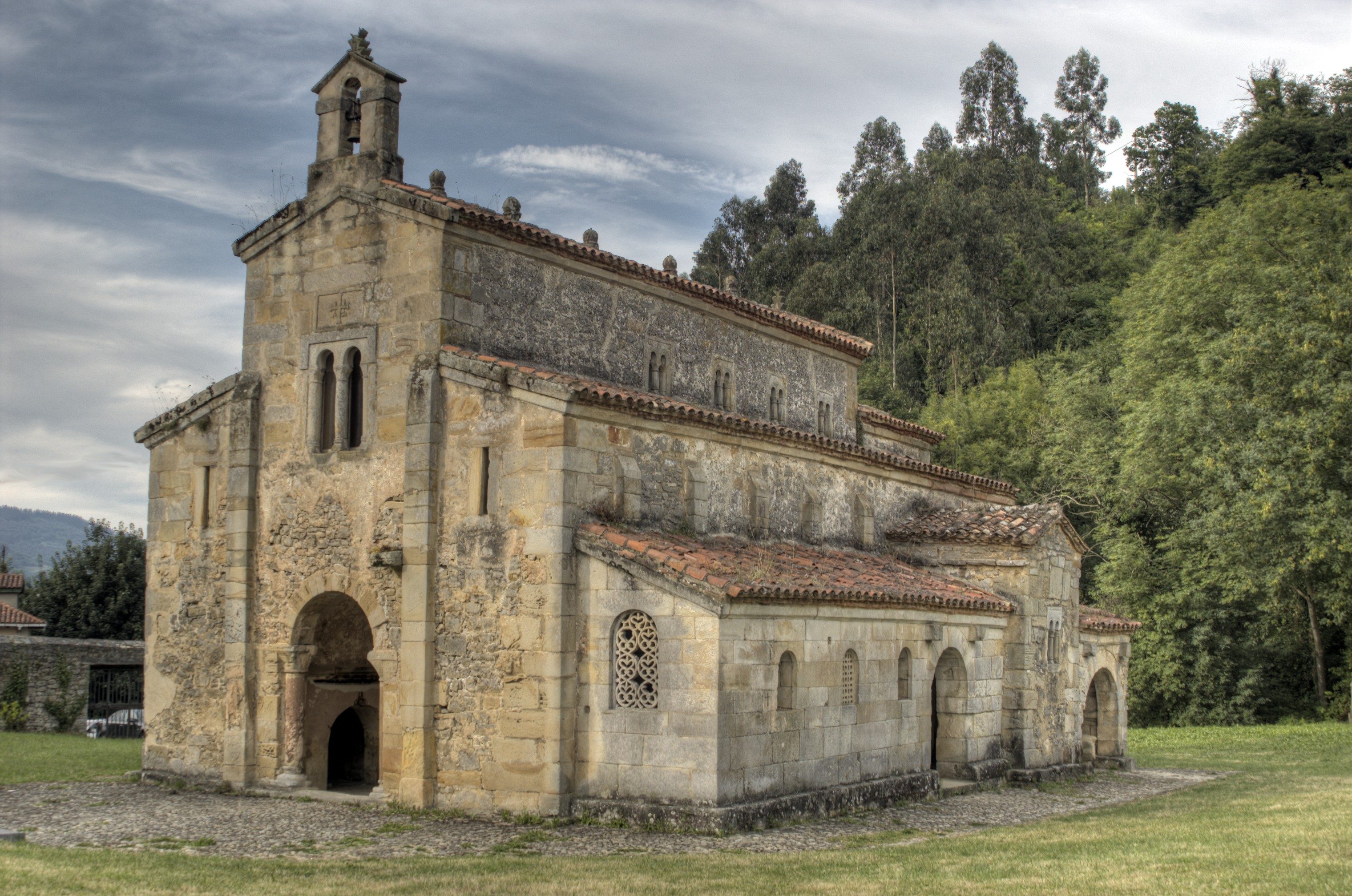 Iglesia prerrománica construida en el año 892 y ubicada en el término municipal de Villaviciosa (Asturias, España), junto al Monasterio de Santa María de Valdediós.